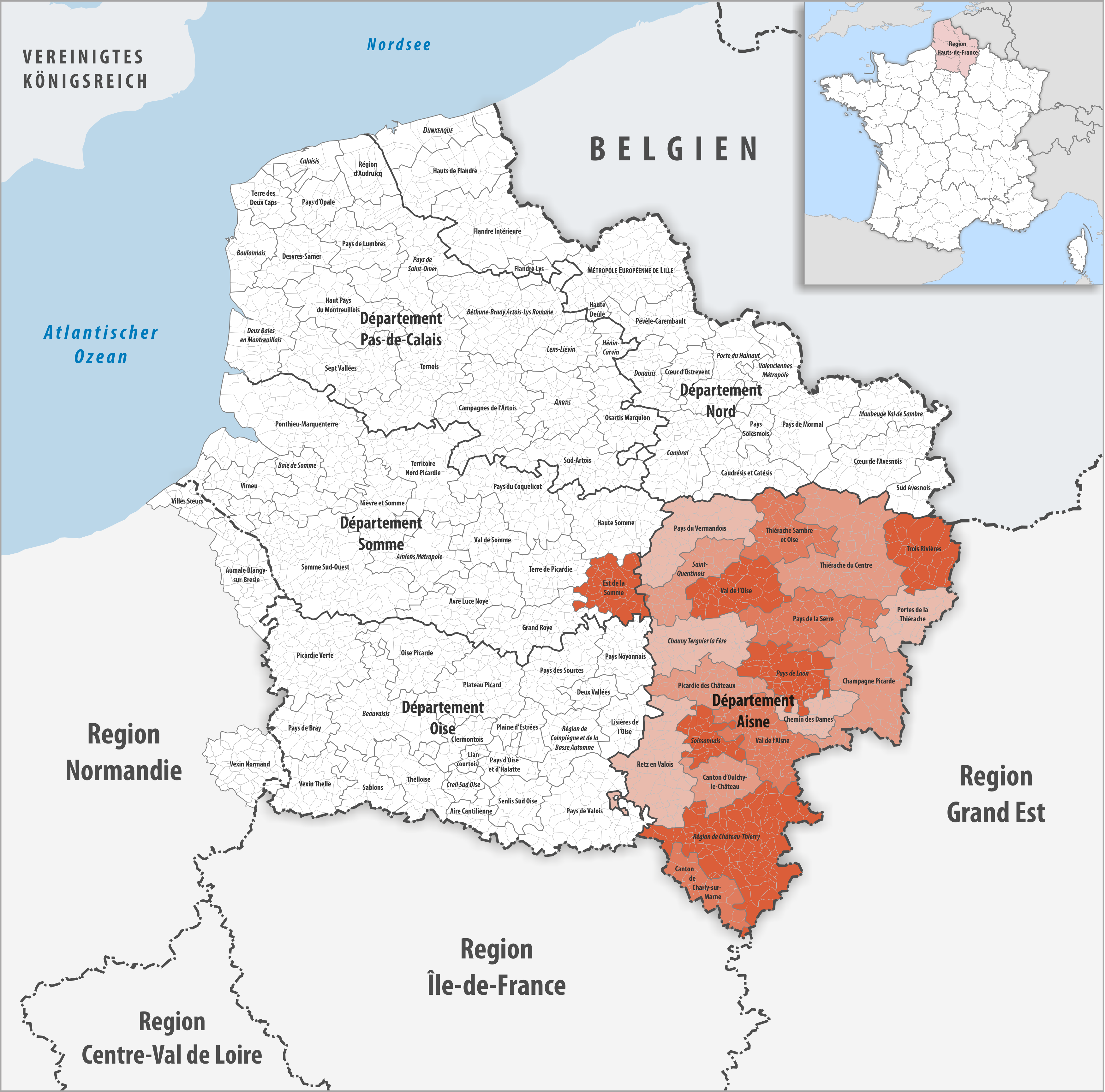 Gemeindeverbände im Département Aisne